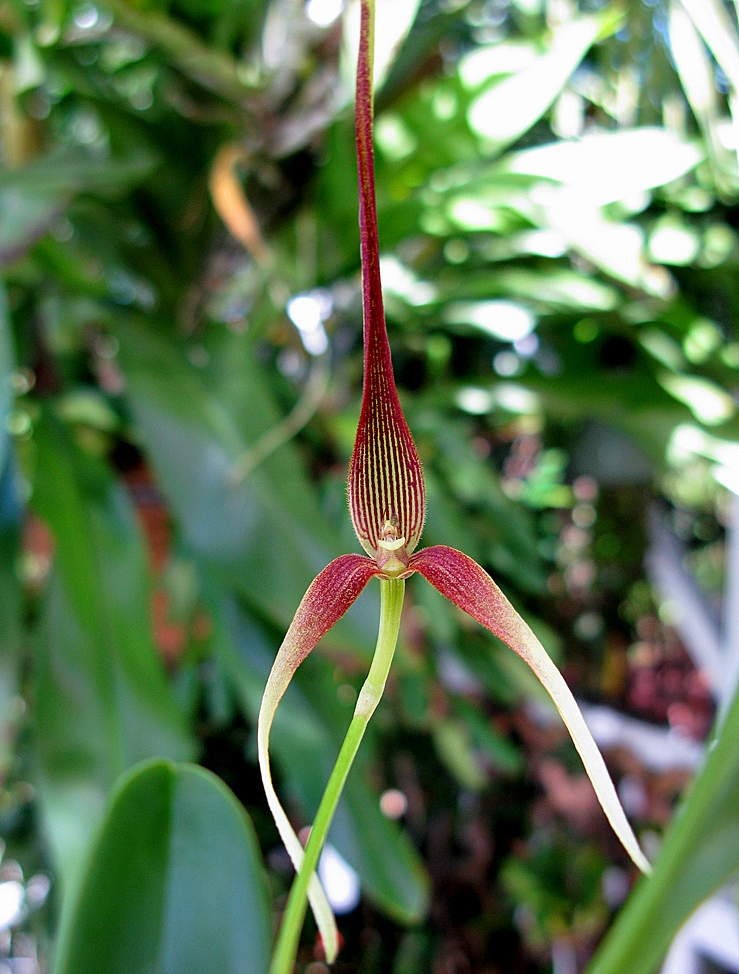 Bulbophyllum unitubum flwr1